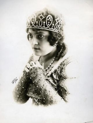 Luisa Villani ca. 1910